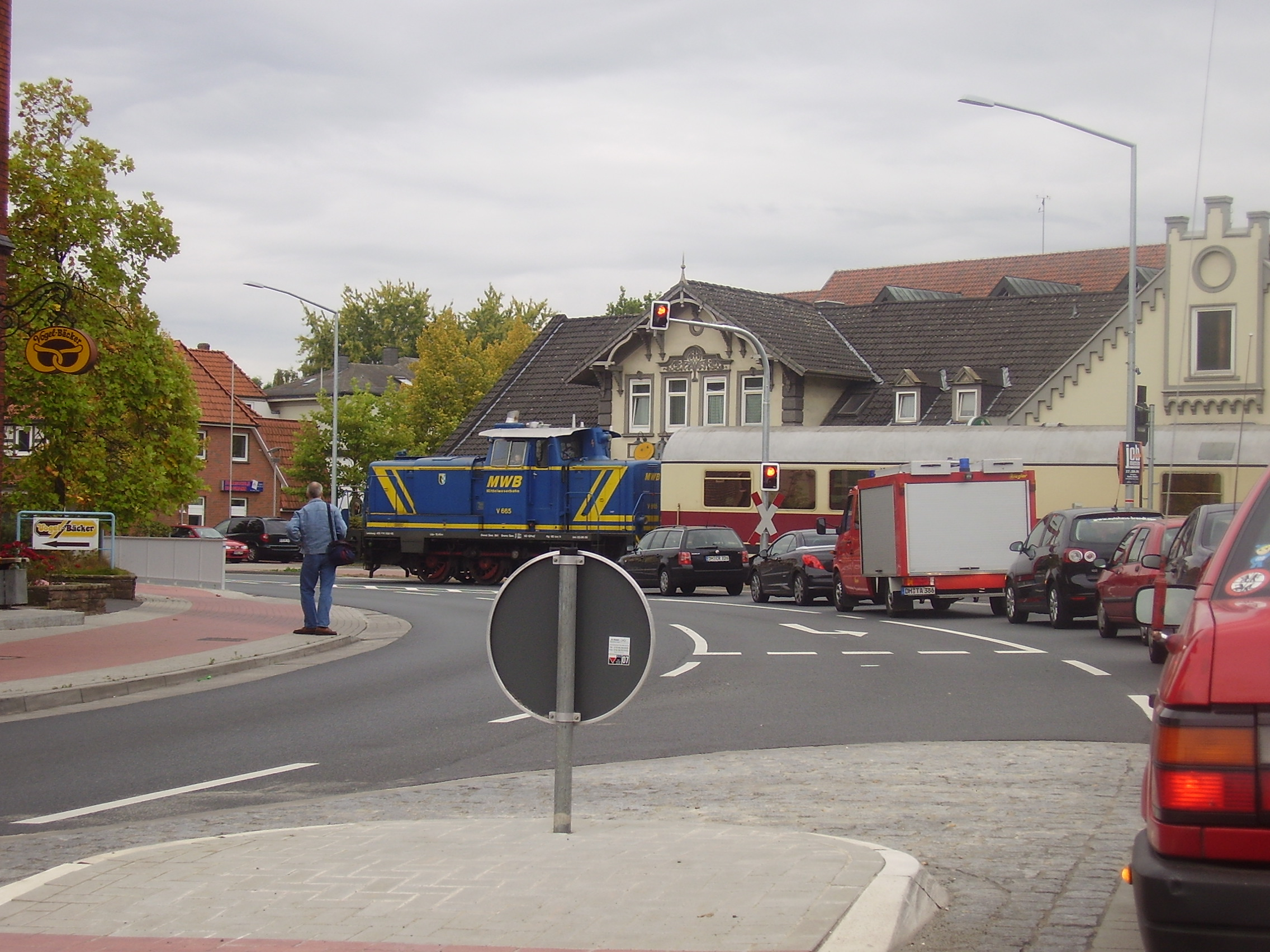 die Schmalspurbahn nach Bruchhausen-Vilsen, die seit September 2008 auf der neu restaurierten Strecke verkehrt; sie überquert die vielbefahrene B6 an einem unbeschrankten Bahnübergang